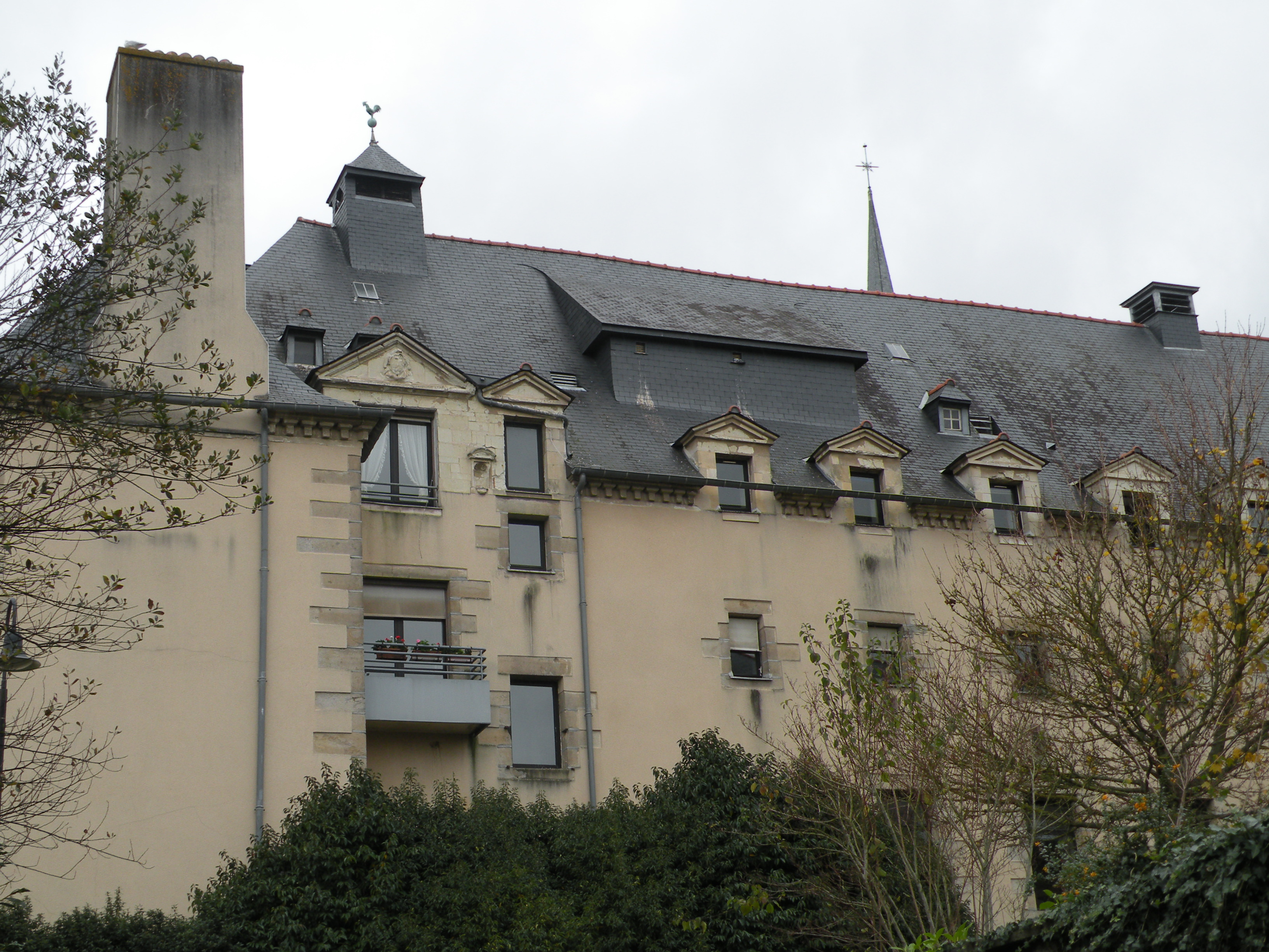 Ancien couvent des Calvairiennes de Saint-Cyr, rue Papu à Rennes, aujourd’hui maison de retraite.